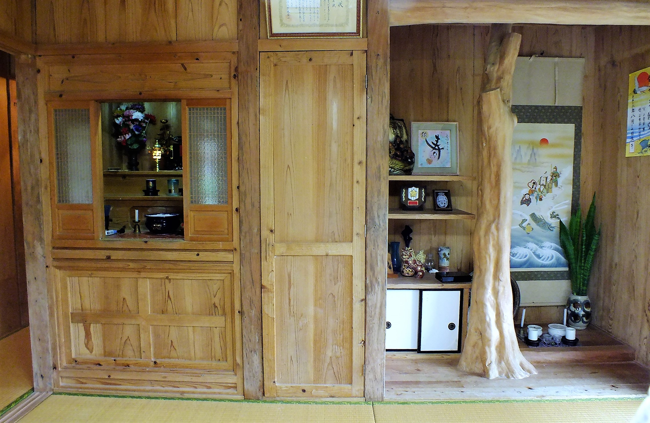 Old house in Taketomi island 竹富島の古民家 伝統的琉球様式の間